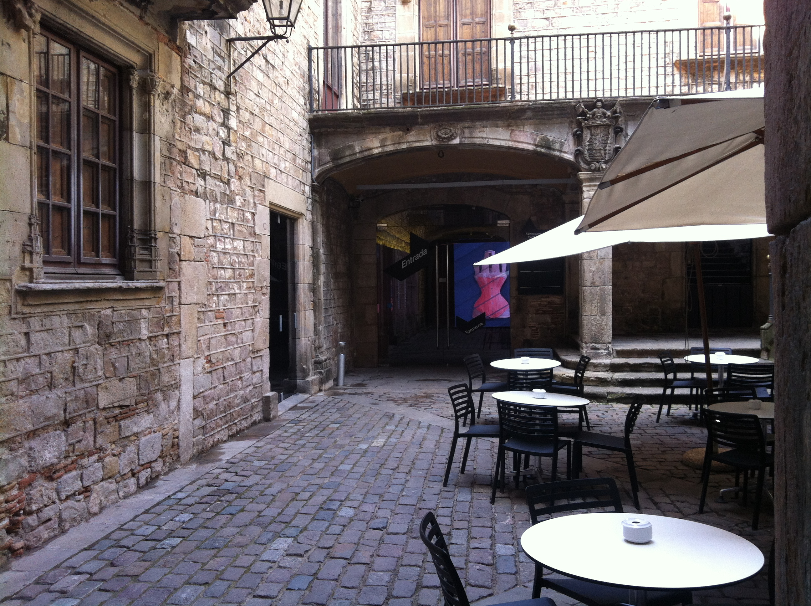 Disseny Hub Barcelona, seu del Carrer Montcada